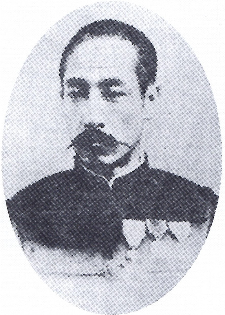 米津政敏の肖像写真。